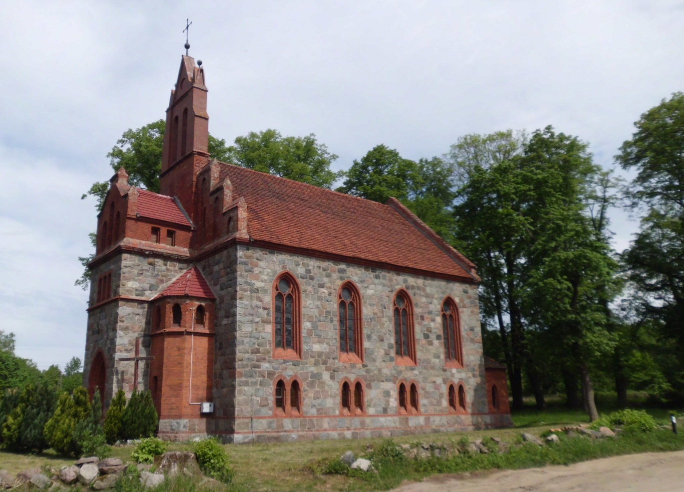 Kurowo - dawny kościół ewangelicki, obecnie rzymskokatolicki filialny p.w. Bożego Ciała, II poł. XIX w.